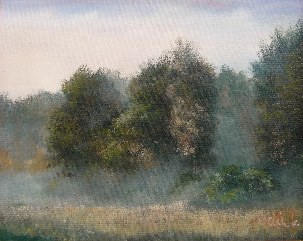 Kati Olah: Symphony of silence, 2005.